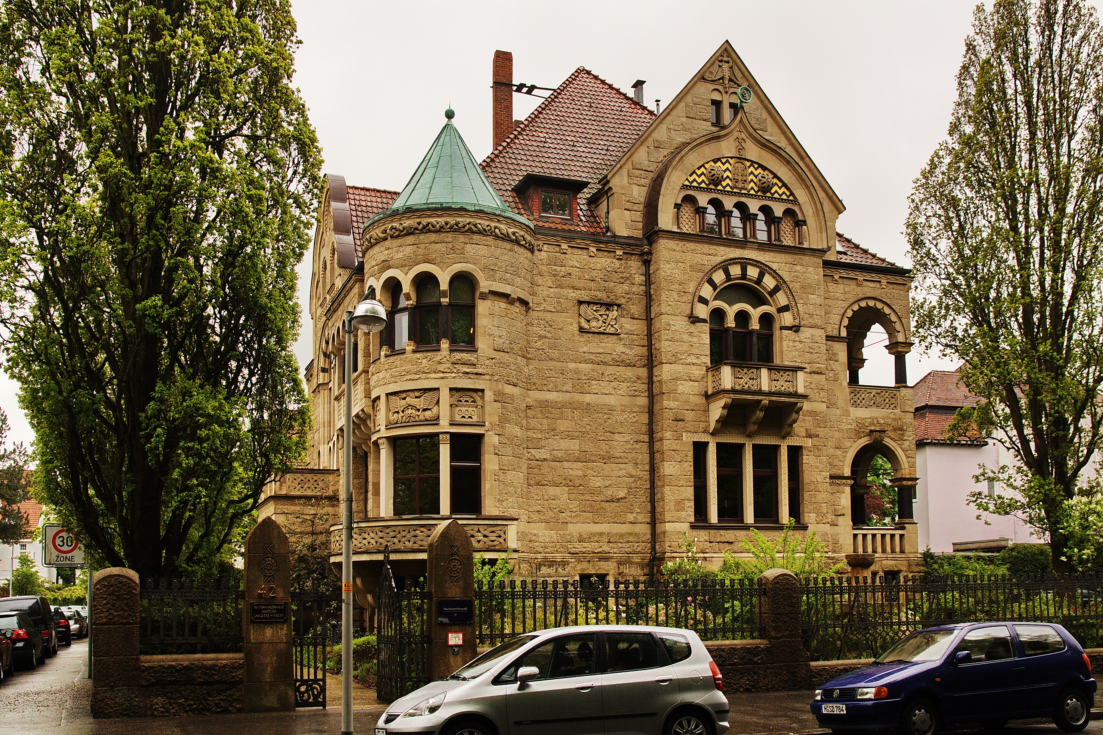 Baudenkmal Hindenburgstraße 42 - Zooviertel (Hannover), Niedersachsen, Deutschland